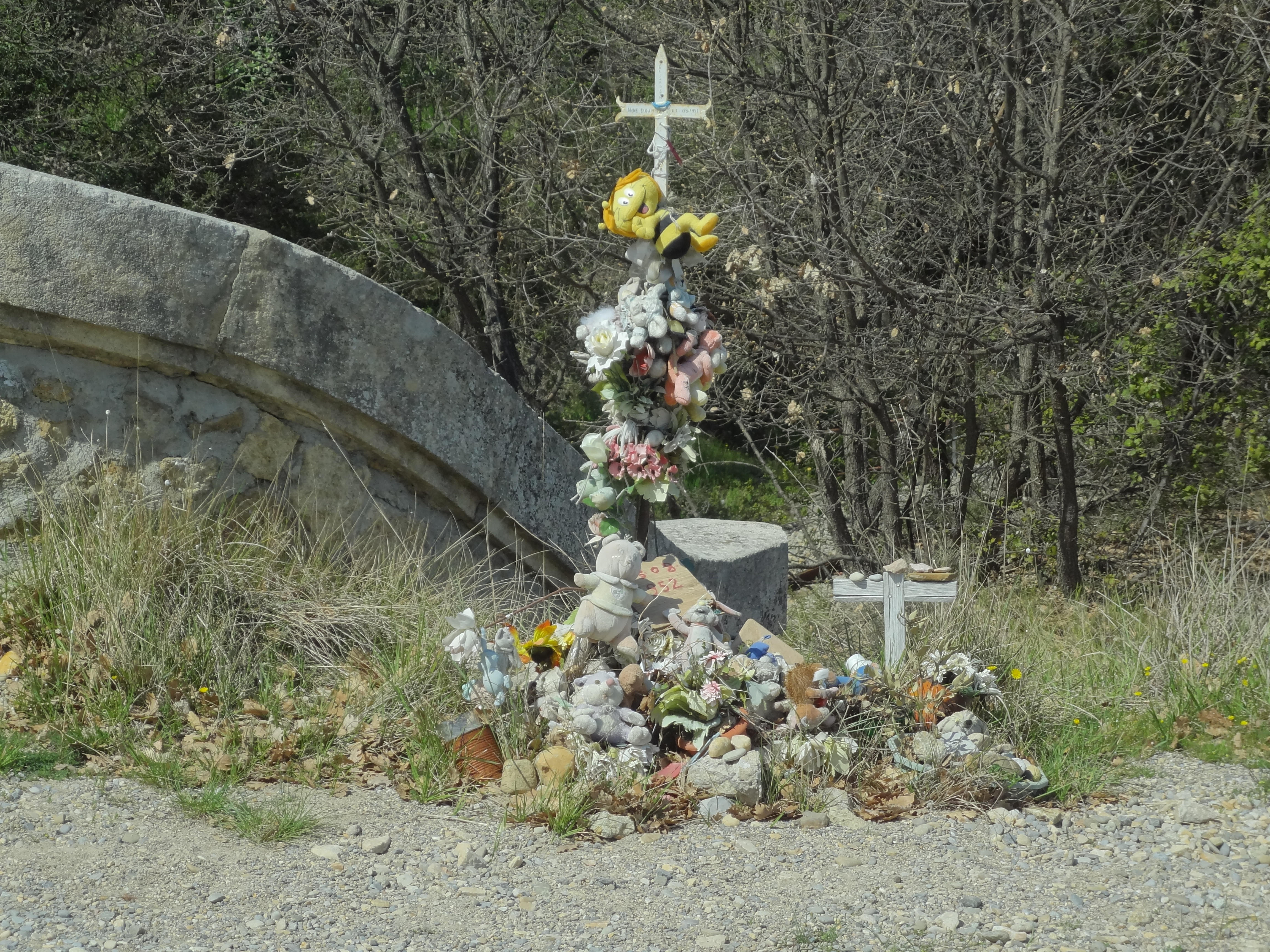 Un des éléments encore visible de l’affaire Dominici : un mémorial aménagé en mémoire du couple Drummond et de leur fille, assassinés dans la nuit du 4 au 5 août 1952